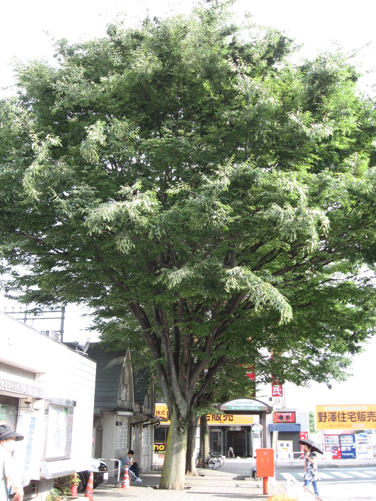 志村けんの木（西武新宿線東村山駅前）